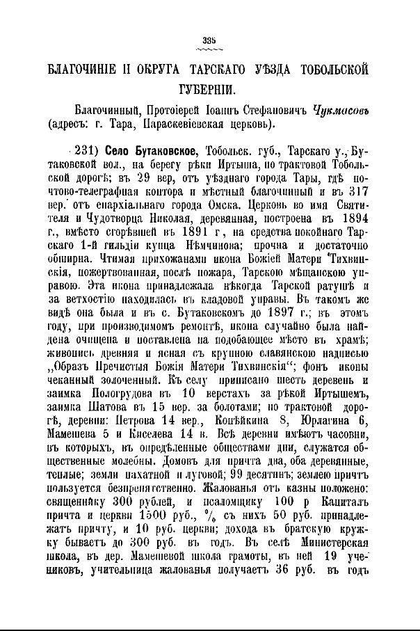 Скан с книги 1900 года.